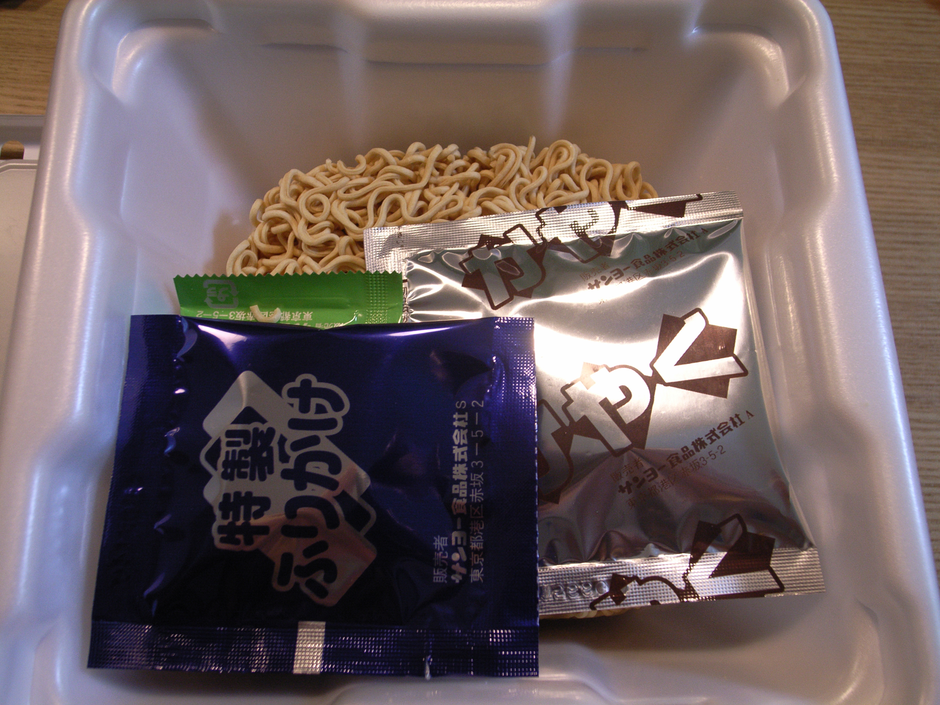 ふたを開けた状態